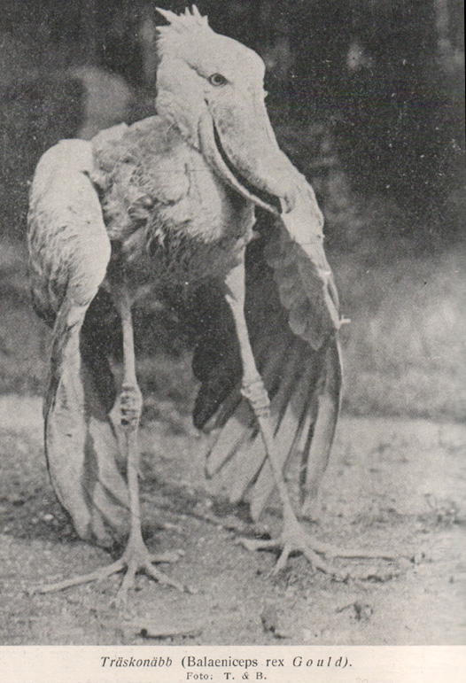 Abu Markúb, Shoebill.